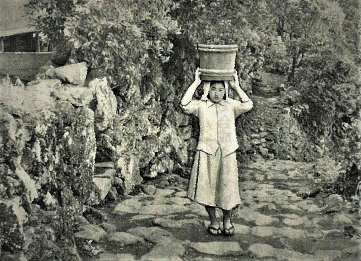 頭に水桶を載せて運ぶ八丈小島鳥打地区の女性（昭和25年頃）